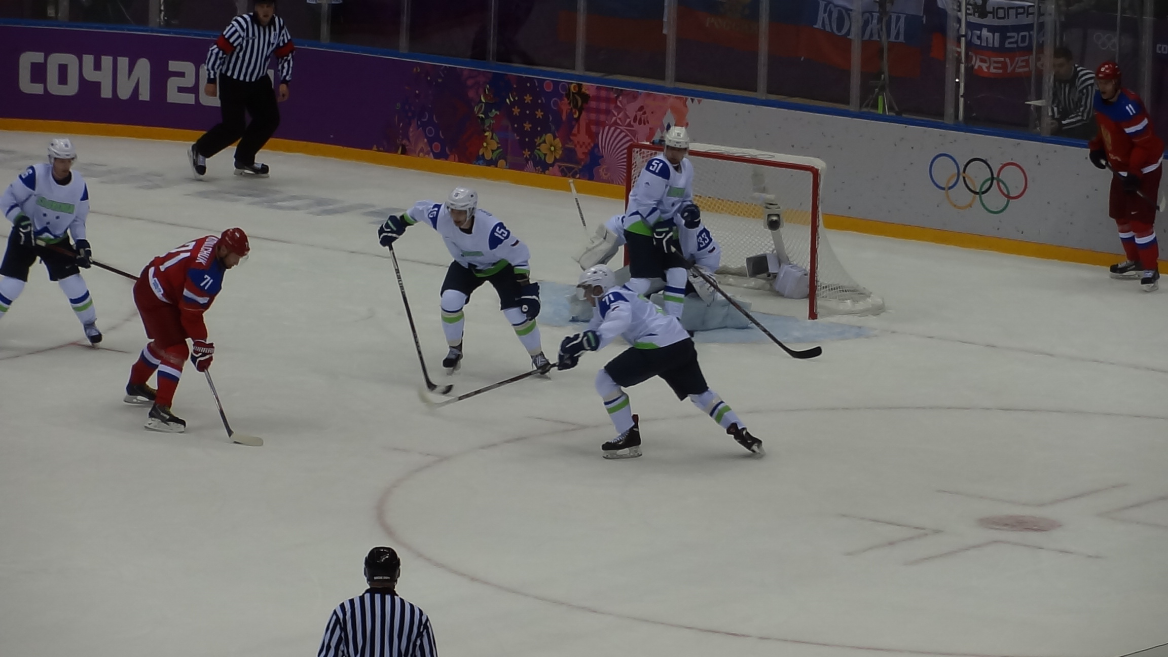 Сочи-2014. Хоккей, Россия — Словения, 5:2.